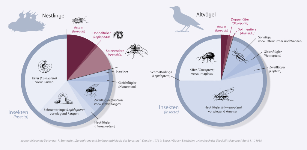 Diagramm: Nahrung von Nestlingen und Altvögeln des Sprossers (Luscinia luscinia)